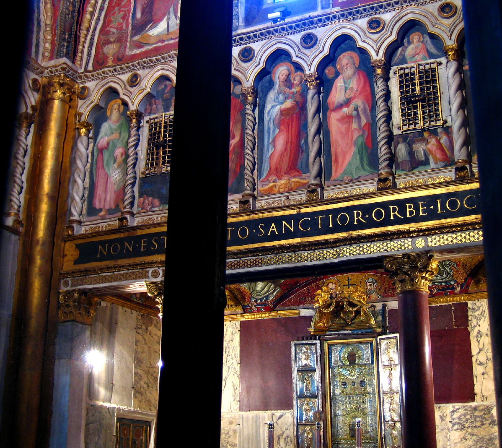 Interno del Sancta Sanctorum della Scala Santa. Roma.